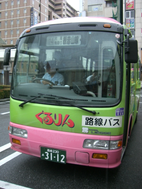 高崎市内循環バスぐるりん